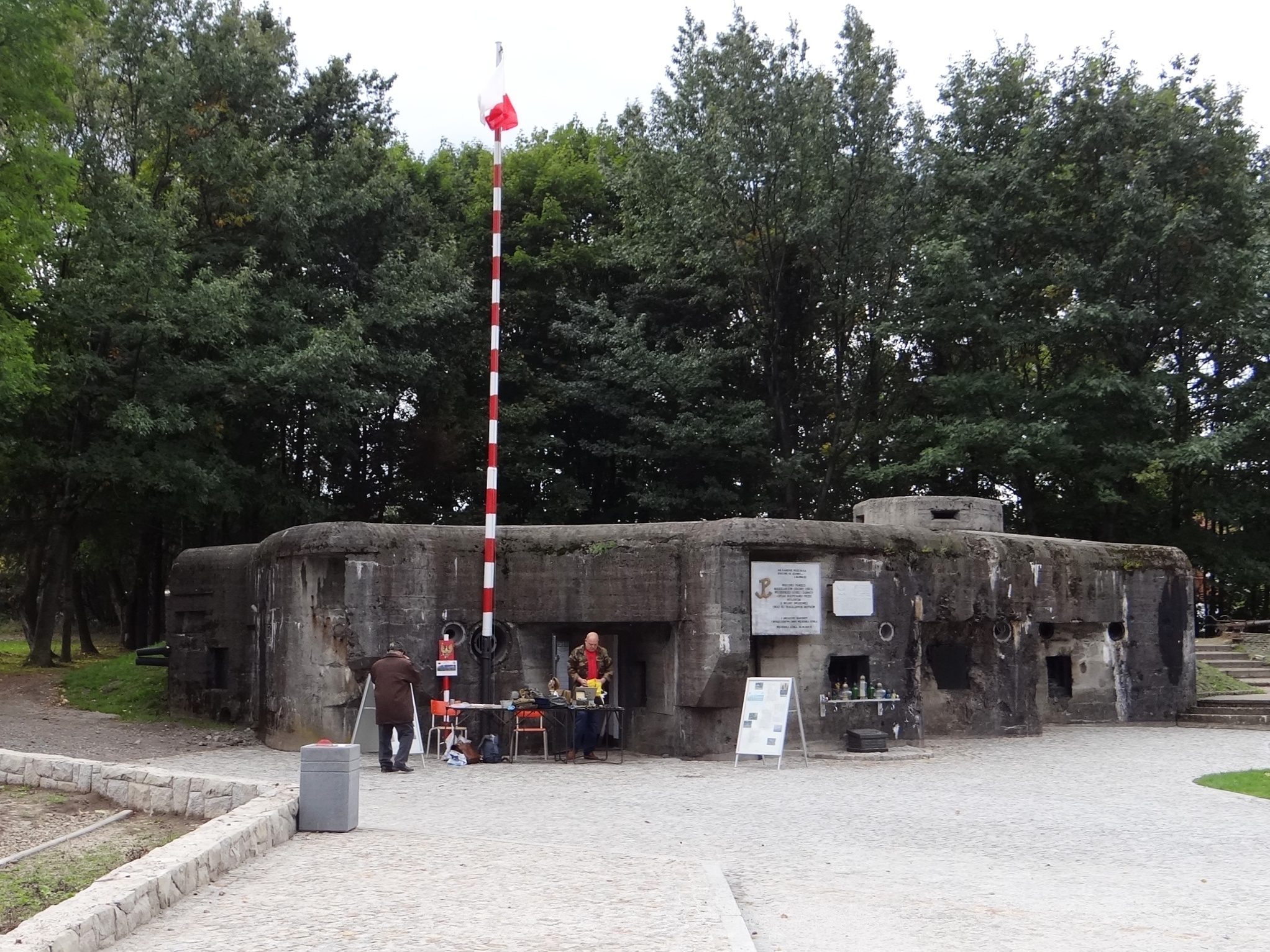 Fort "Wędrowiec" w Żabnicy